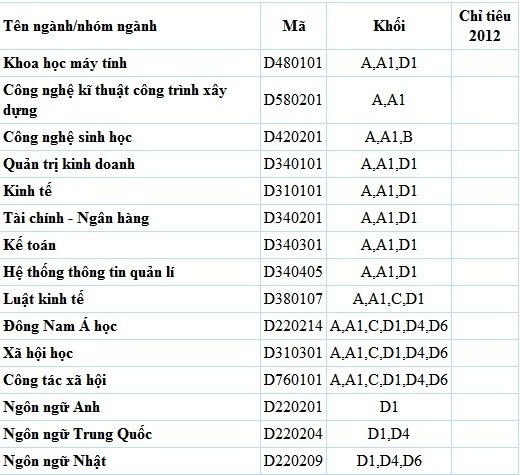 THÔNG TIN TUYỂN SINH NĂM 2012